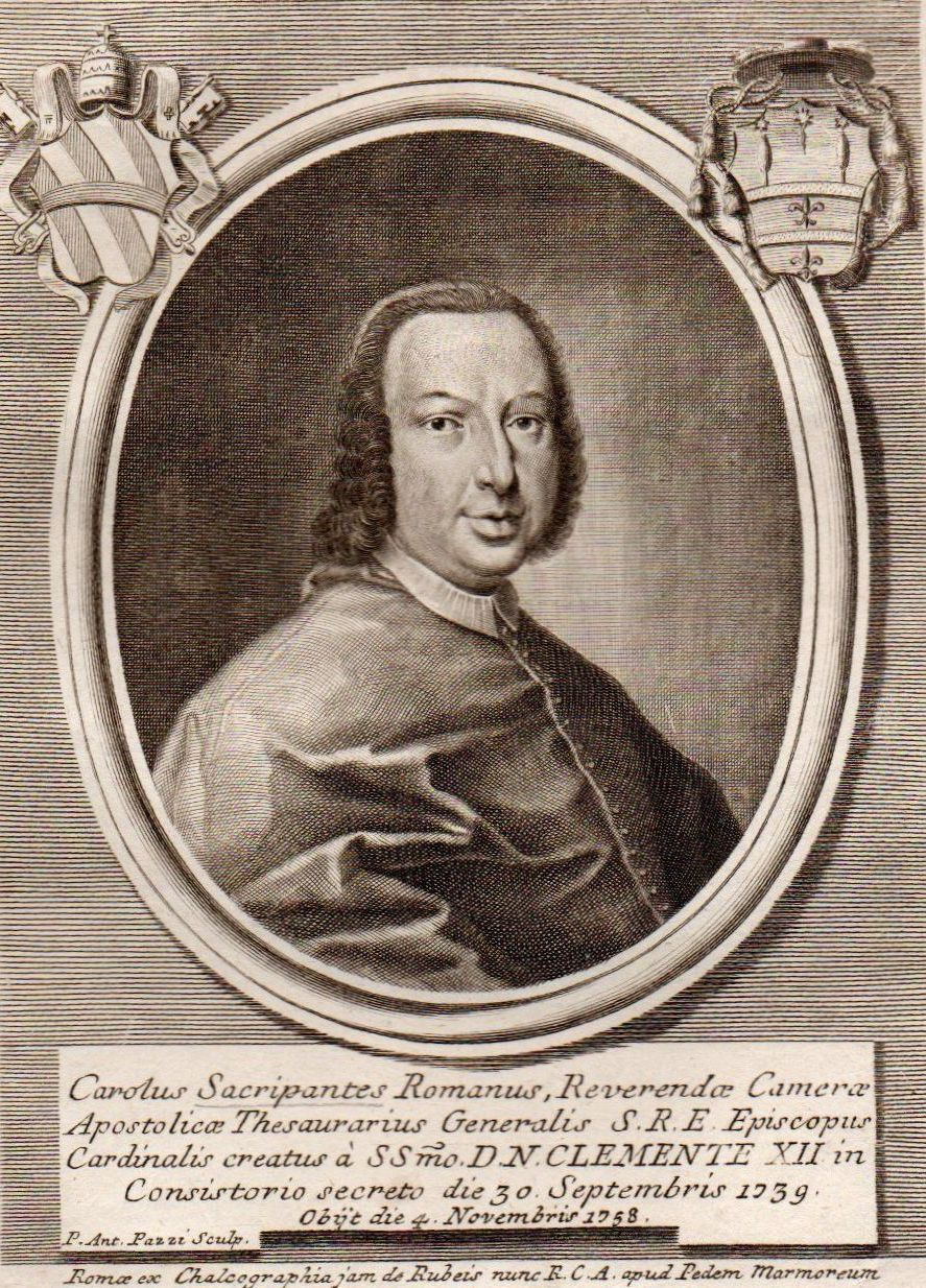 Incisione a bulino originale del XVIII secolo